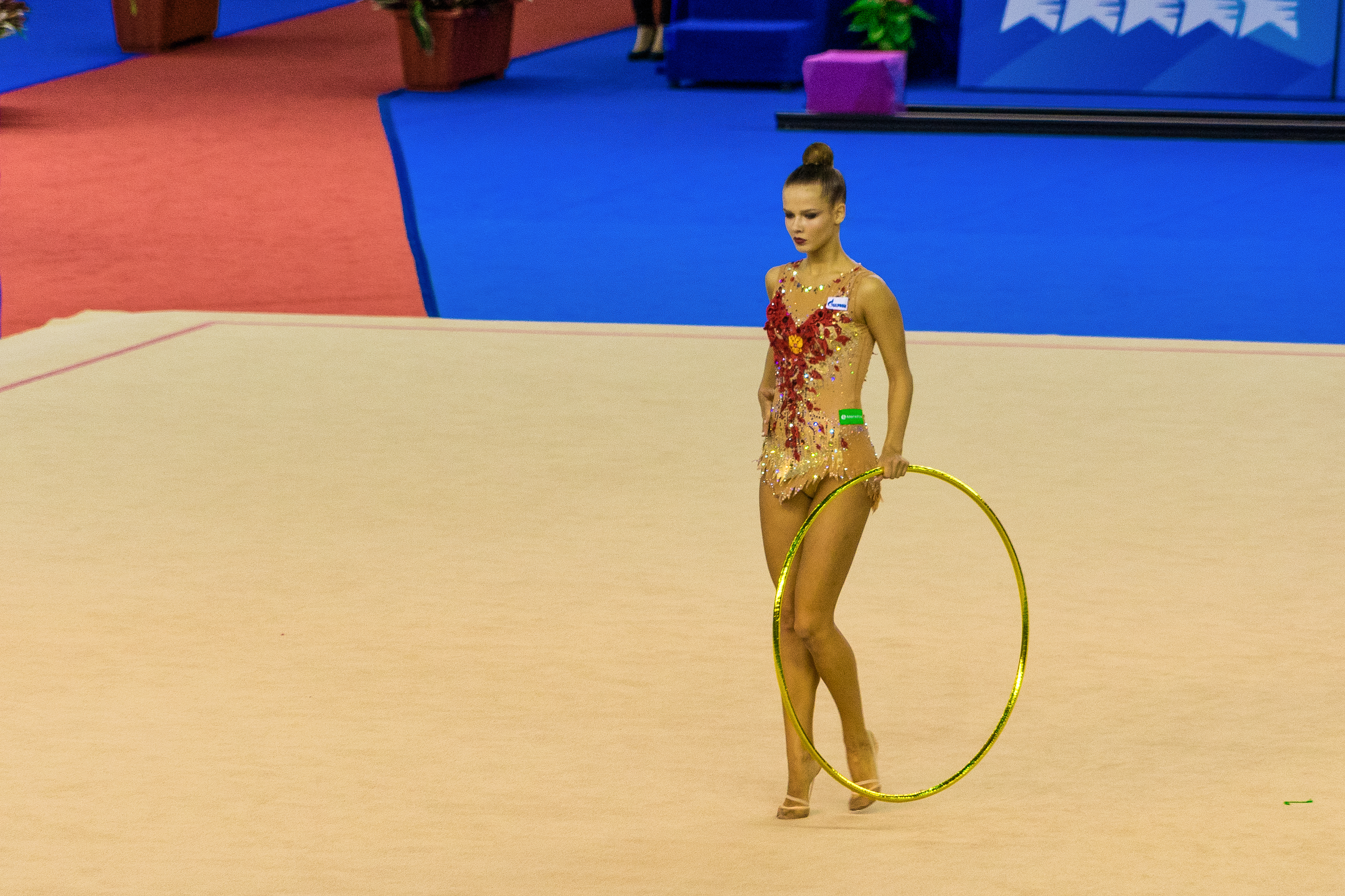 2017 Taipei Summer Universiade